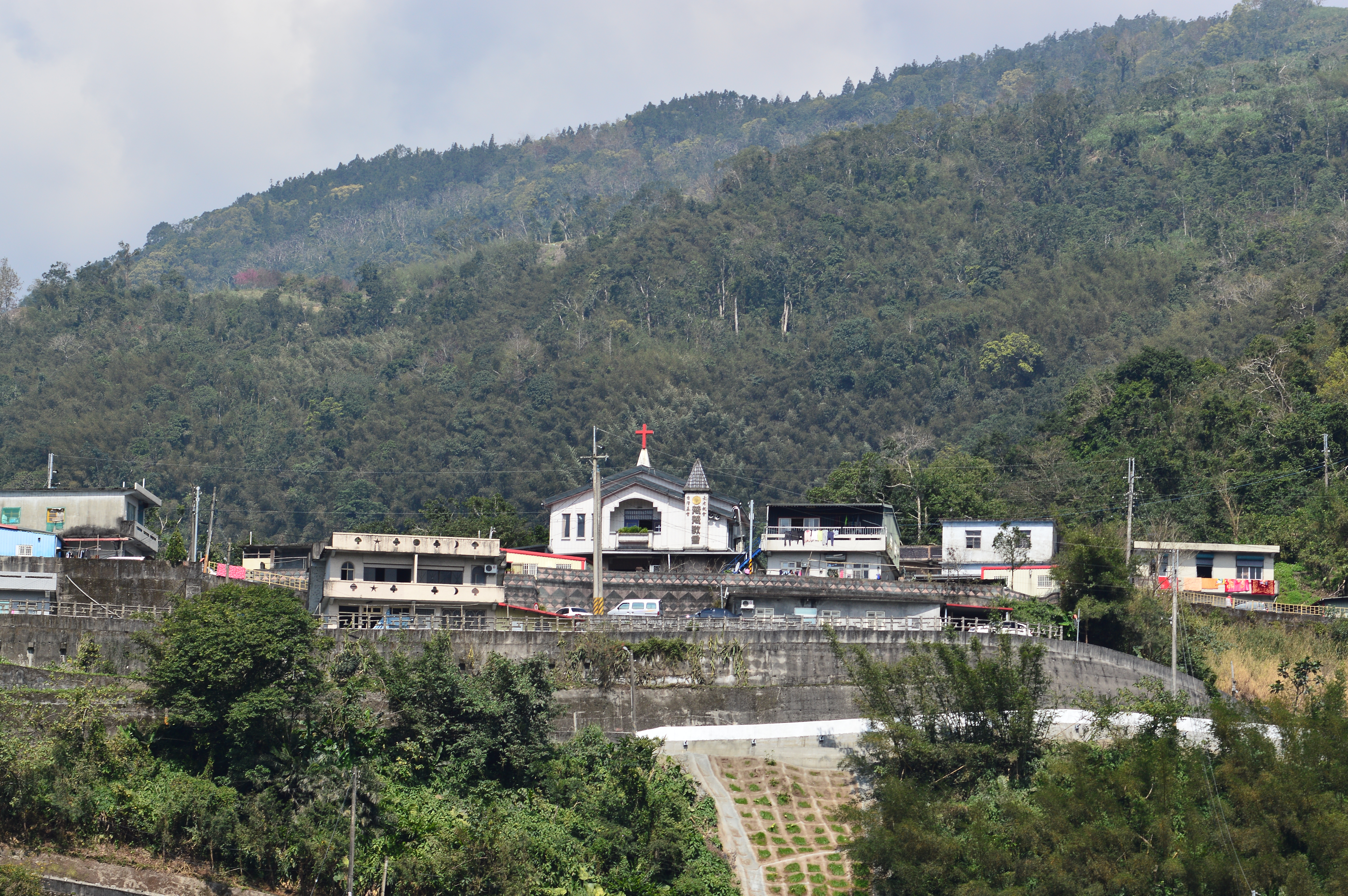 中文（台灣）: 台灣基督長老教會芃芃教會，地址：宜蘭縣大同鄉英士村46號。